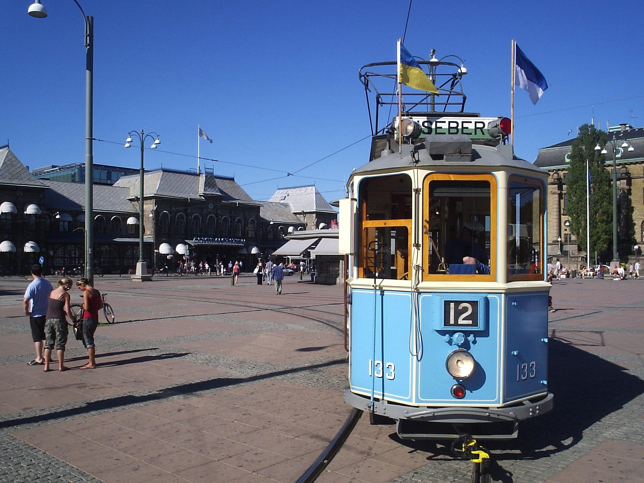 Äldre spårvagn på Drottningtorget i Göteborg